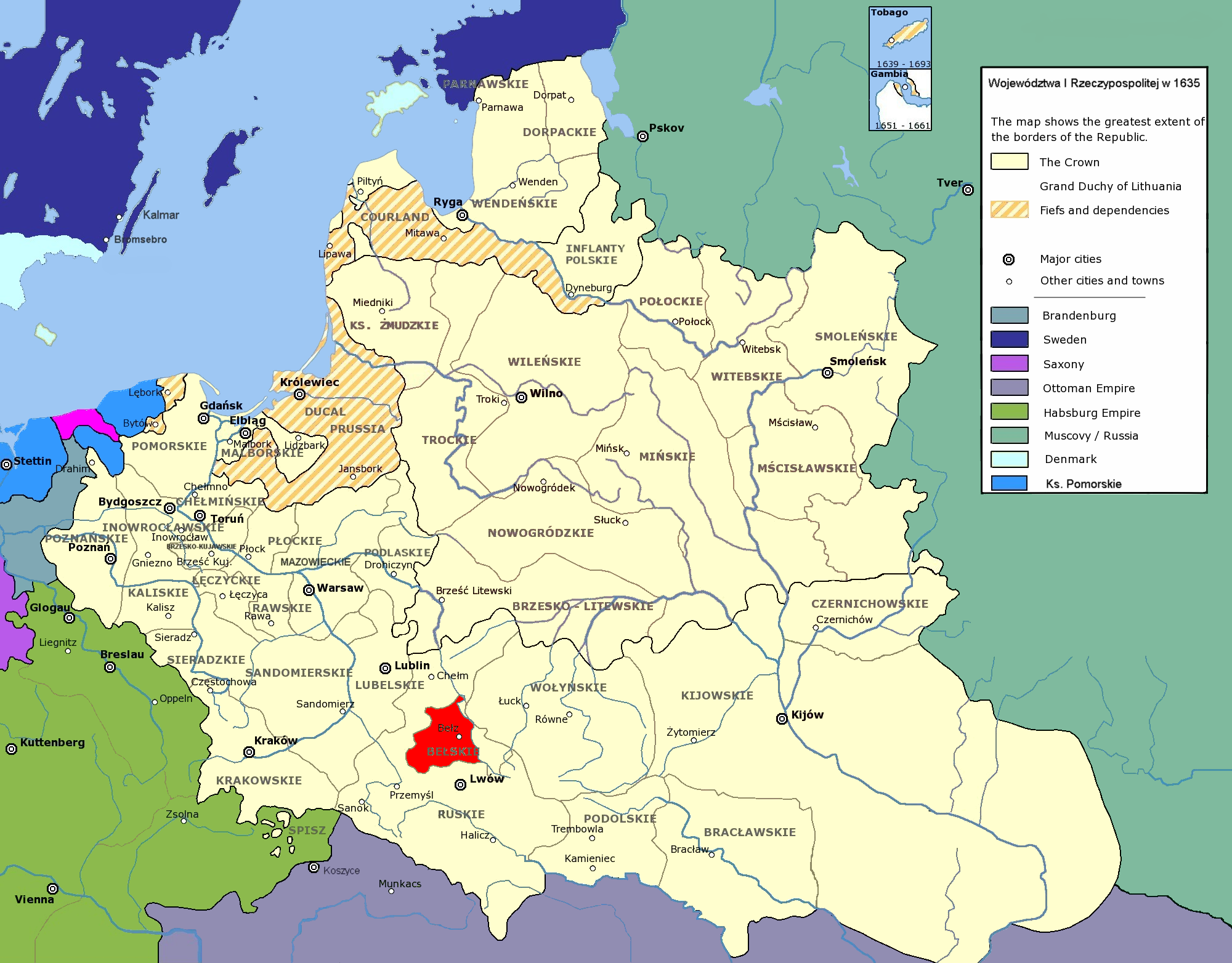 Rzeczpospolita Obojga Narodów w 1635 r.; województwo bełskie Polish-Lithuanian Commonwealth in 1635; Bełz Voivodeship